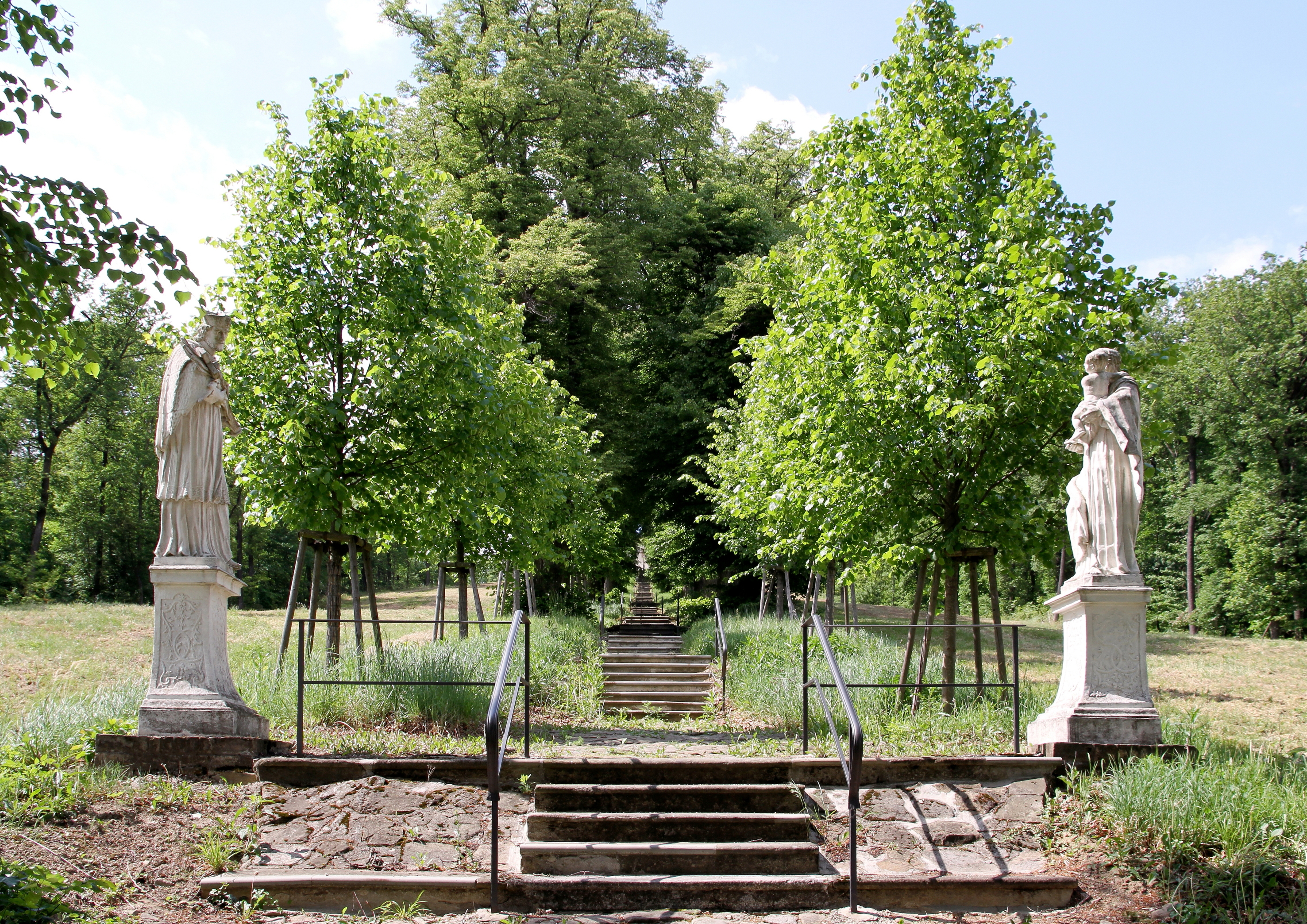 Barocke Stiegenanlage zur Pfarrkirche in Karnabrunn, ein Dorf in der niederösterreichischen Marktgemeinde Großrußbach.